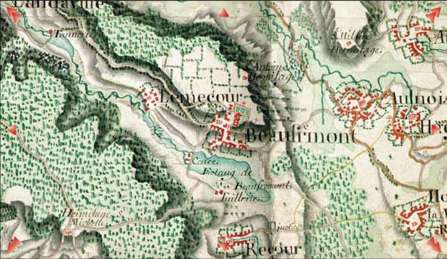 Cartes des Naudins des environs de Beaufremont